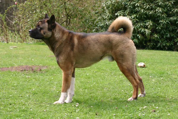 American Akita „Arborlanes Mad-Max to Katana-Ken“ (American Akita von Katana-ken)